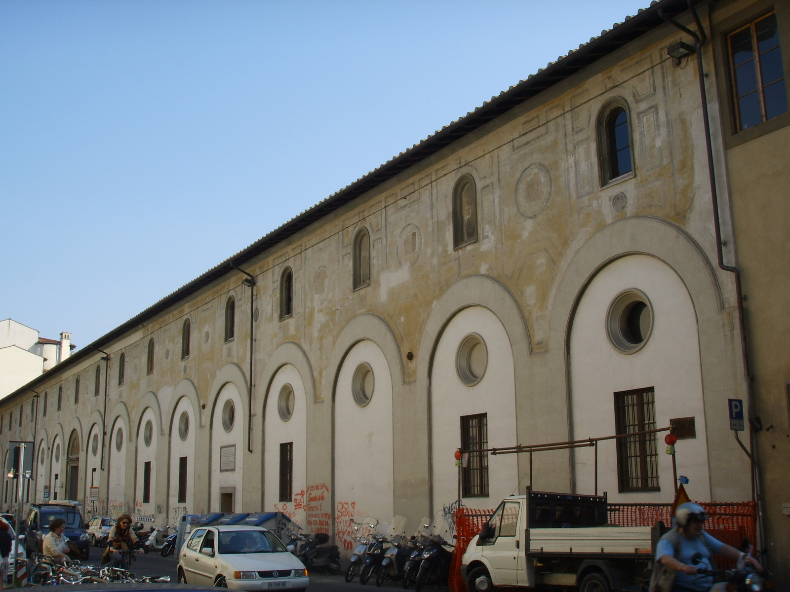 Ex_monastero_via_della_colonna in Florence